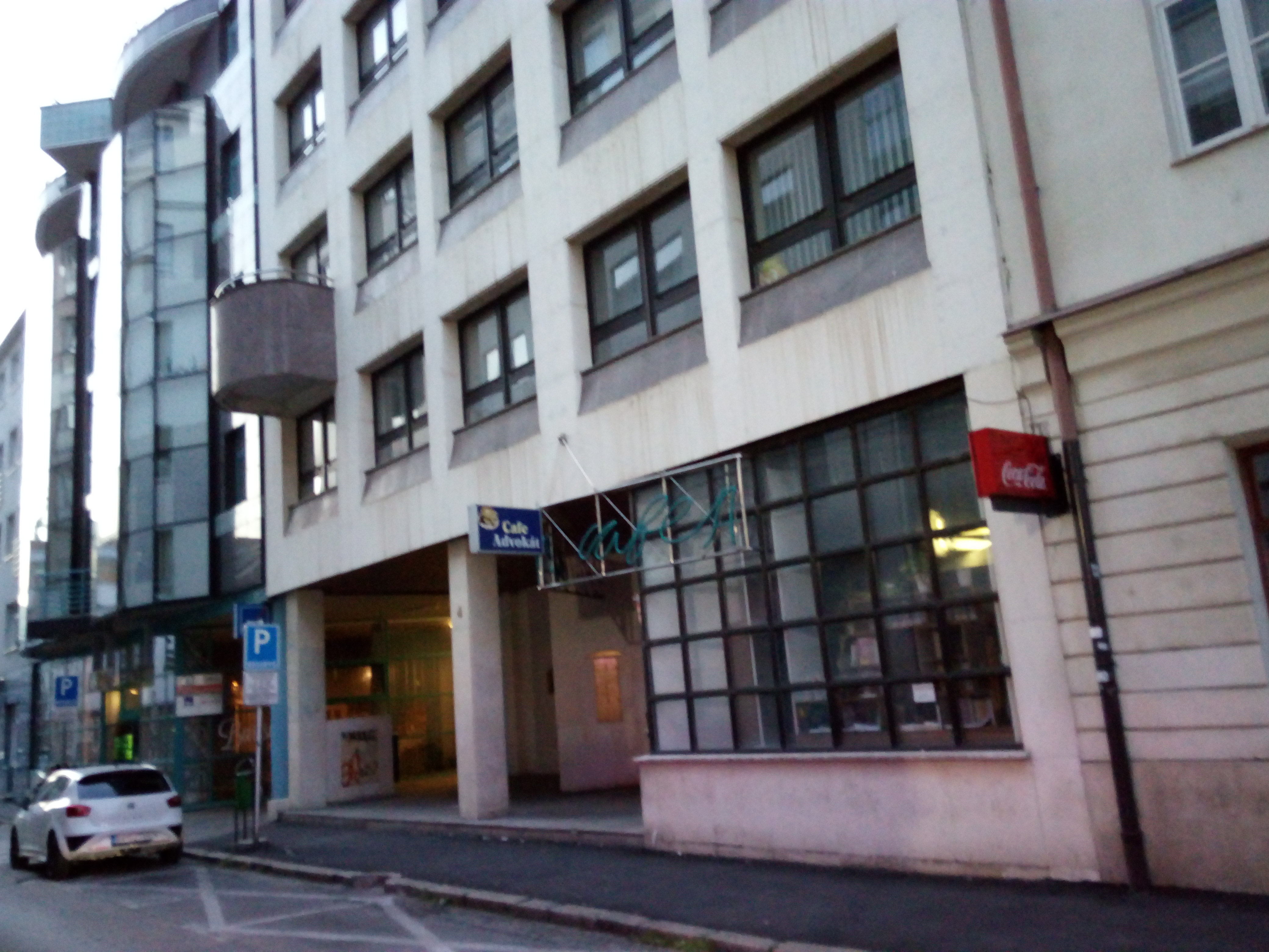 Kolárska 4, Staré Mesto, Bratislava